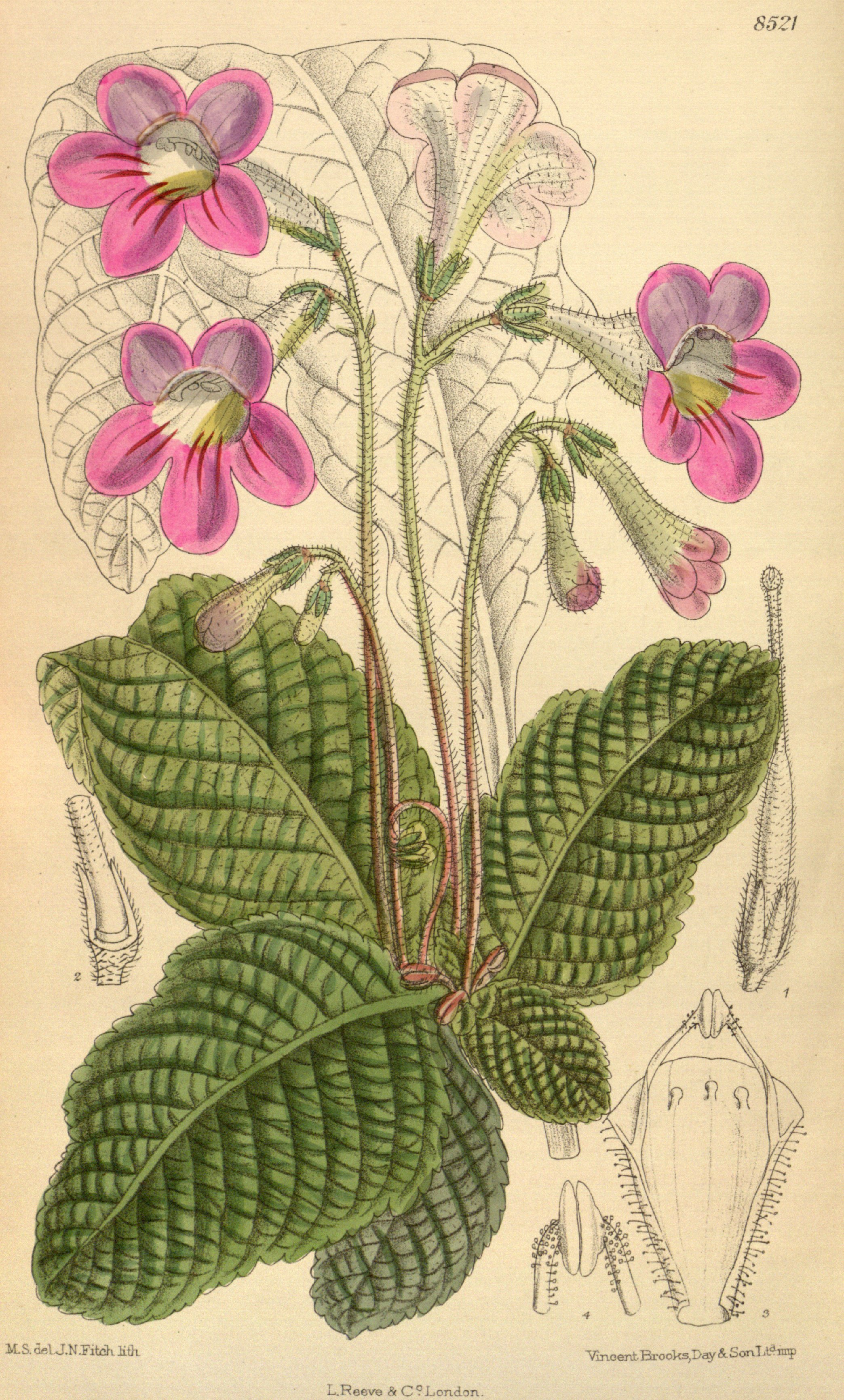 Streptocarpus cyaneus, Gesneriaceae